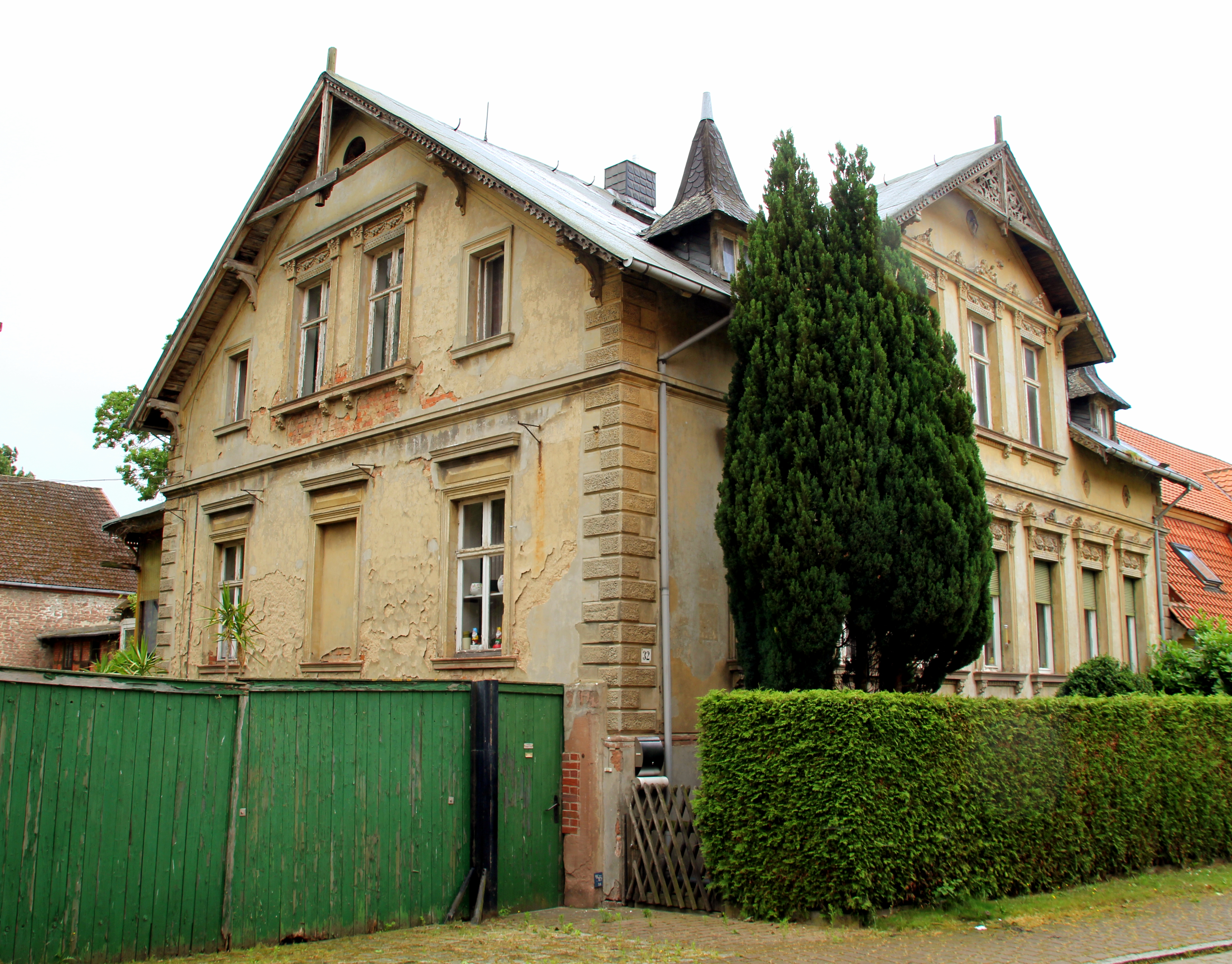 Wohnhaus Hauptstraße 32 Nordgermersleben